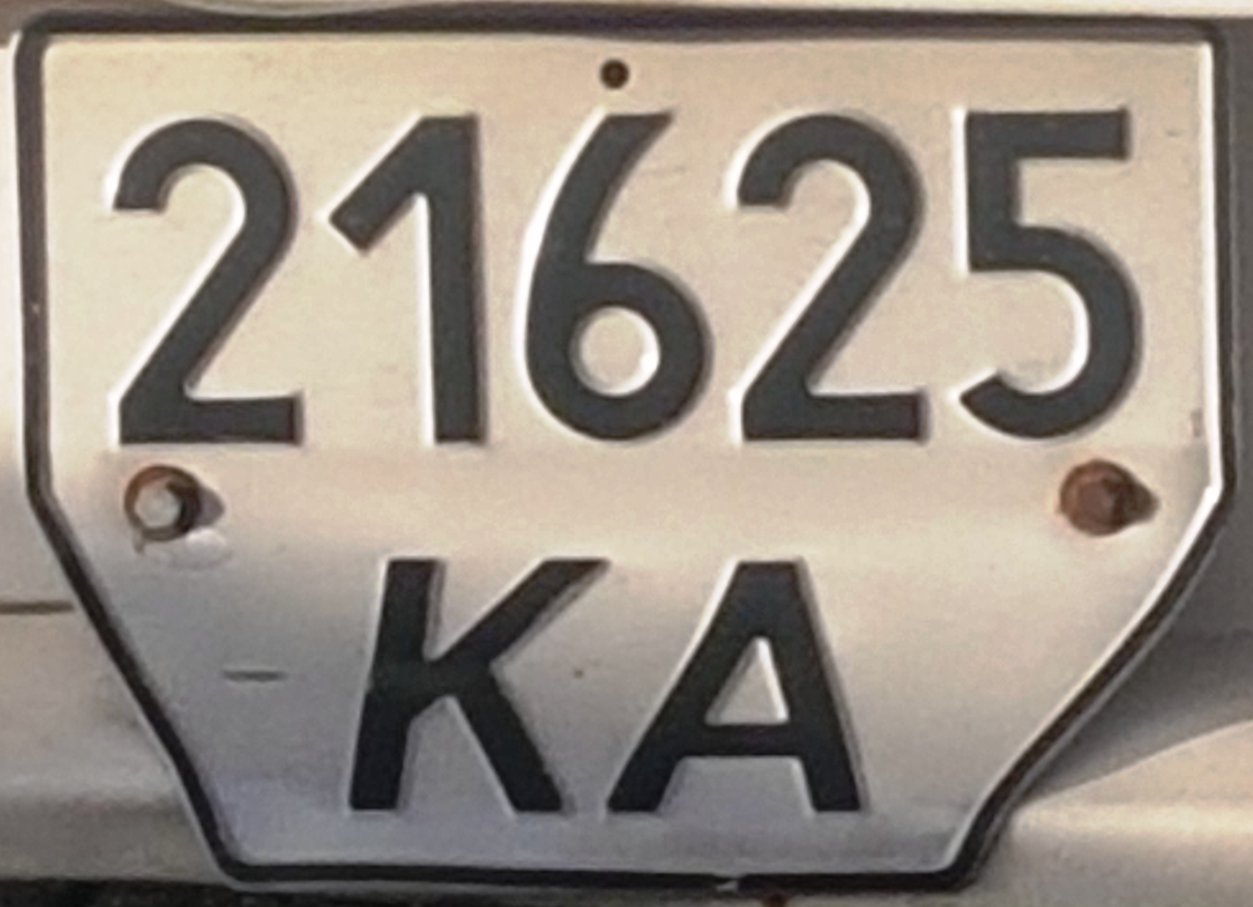 Trailer plaat Oekraine